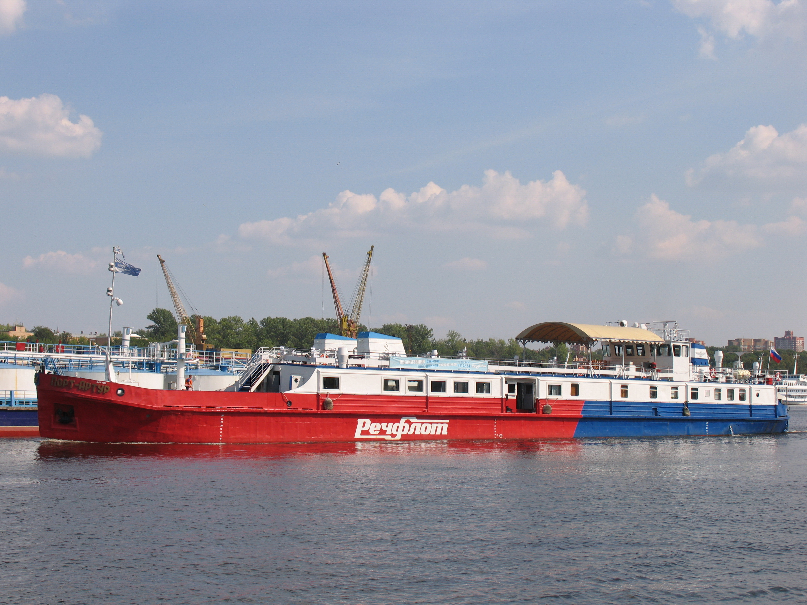 Теплоход-кафе "Порт-Артур" на Химкинском водохранилище.